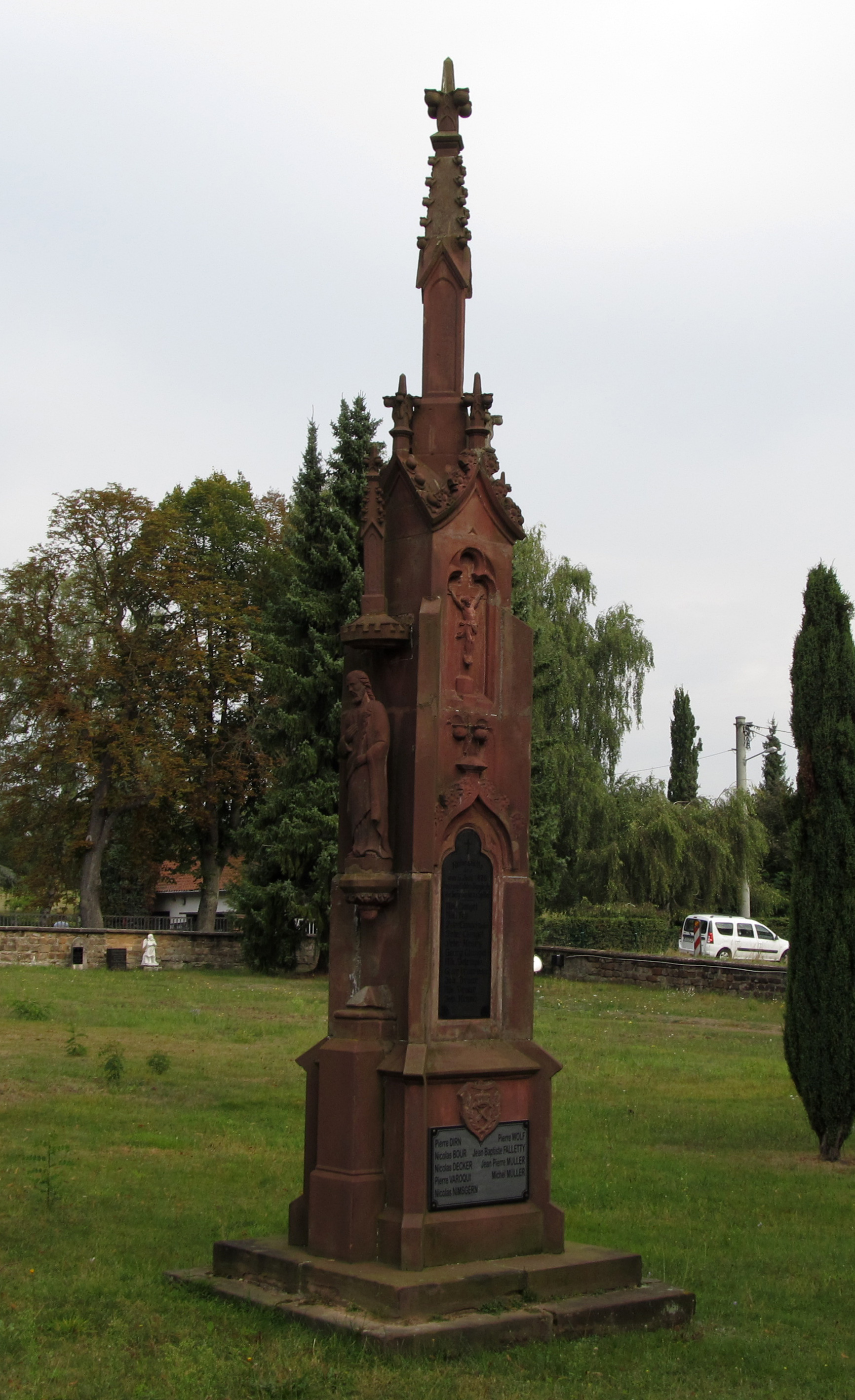 Bergmannsdenkmal hinter der katholischen Pfarrkirche St. Paulinus in Lauterbach, einem Stadtteil von Völklingen, Saarland